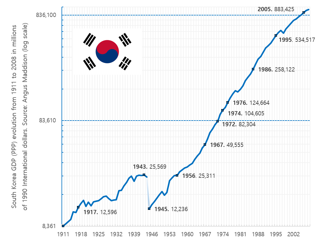 South Korea GDP (PPP) evolution from 1911 to 2008 in millions of 1990 International dollars: log scale. Source: Angus Maddison. South Korean flag from File:Flag of South Korea.svg.